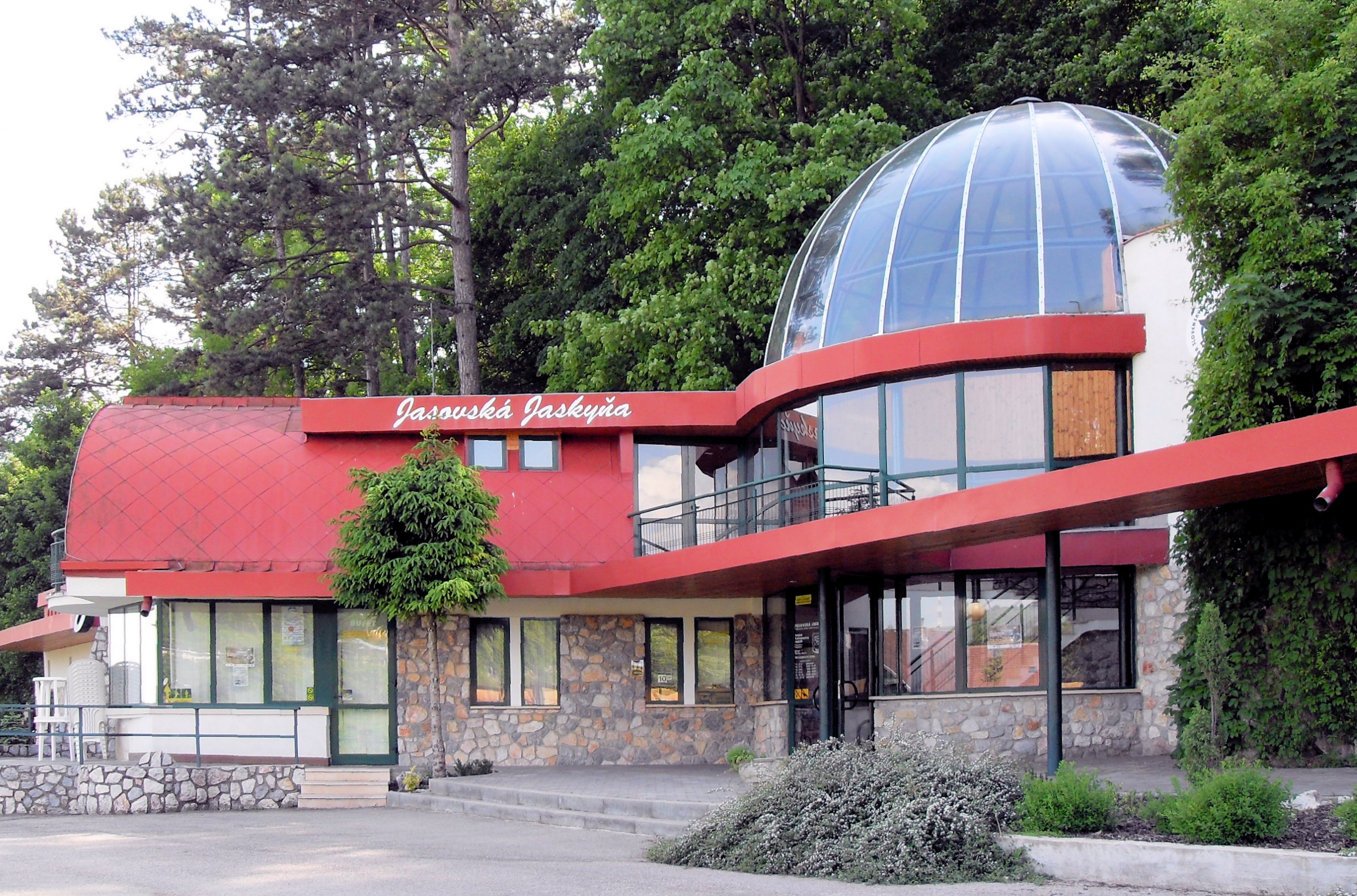 Vchod do jaskyne v Jasov